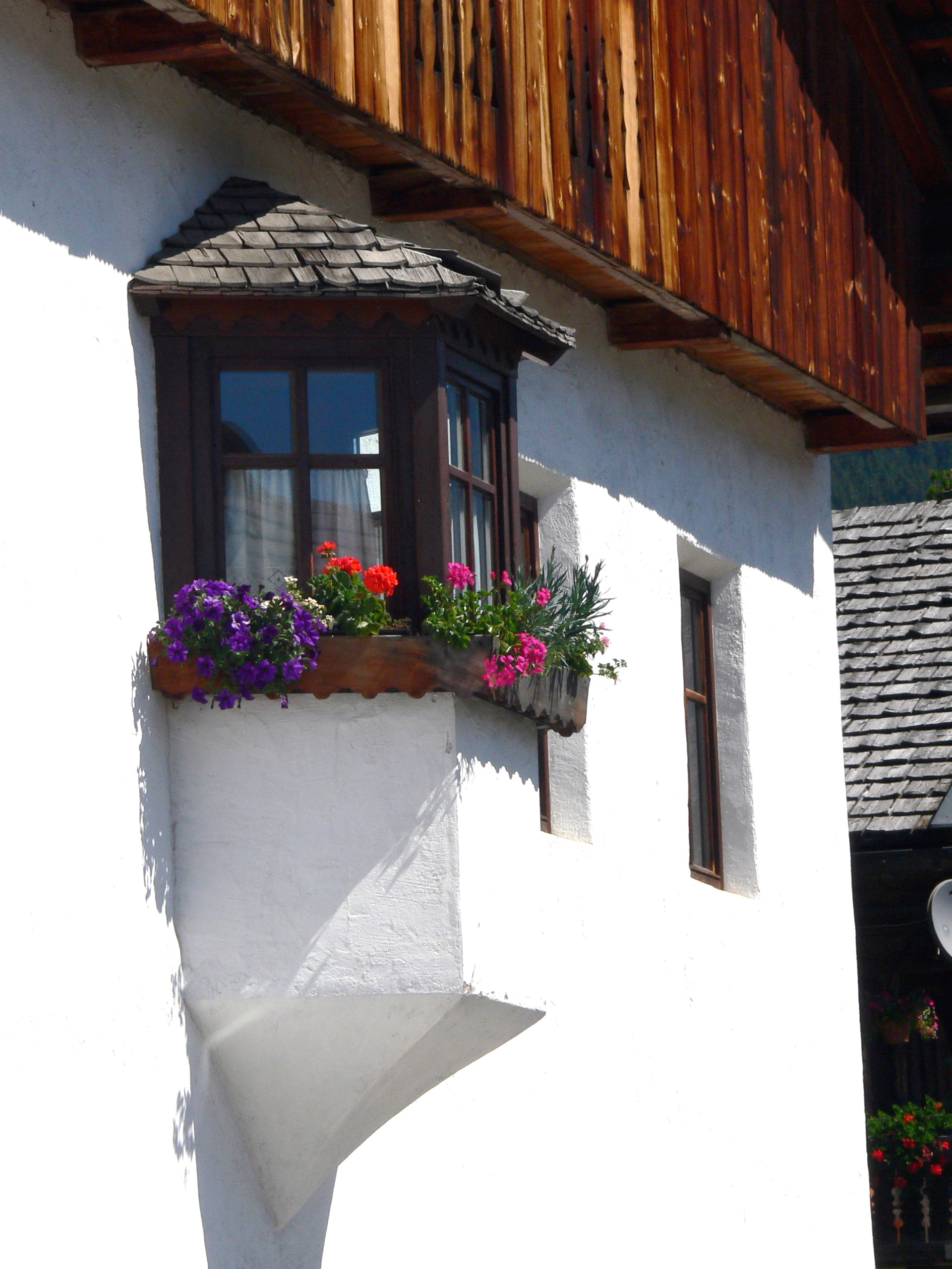 Taisten im Pustertal. Erker